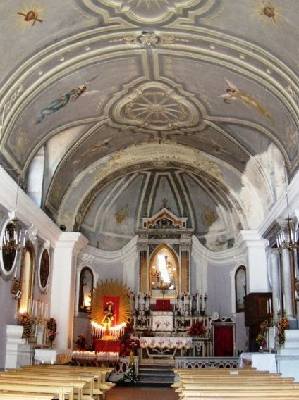 Interno della chiesa di San Rocco in Cerreto Sannita, provincia di Benevento.